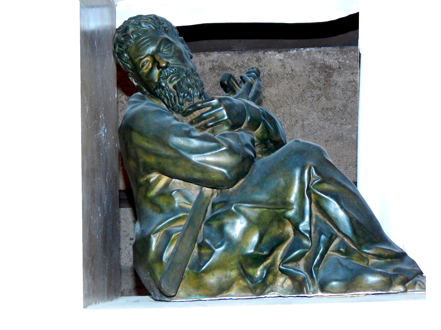 Jerozolima, Grota Pojmania Jezusa, Grota Getsemani